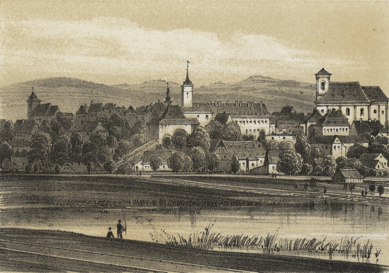 Hohenstadt